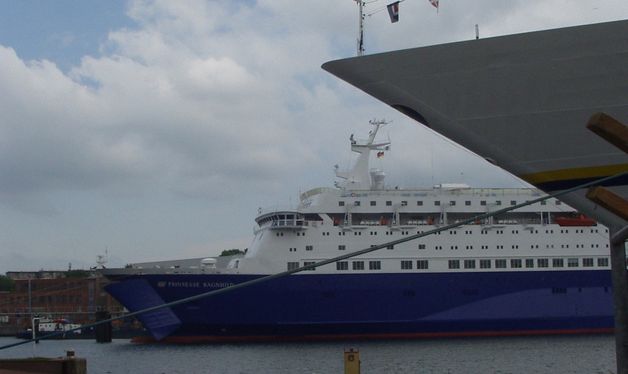 'Prinsesse Ragnild' mit geöffnetem Bug in Kiel (2003)